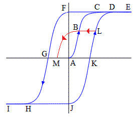 Hysteresekurve mit Bezugspunkten